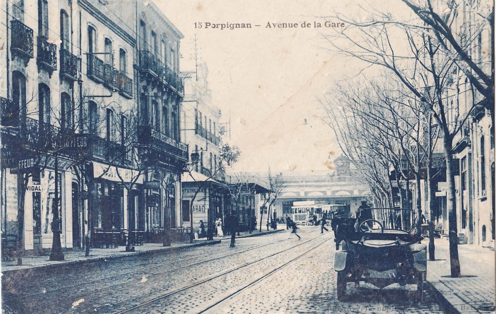 Carte postale ancienne sans mention d'éditeur, n°15 : PERPIGNAN - Avenue de la Gare